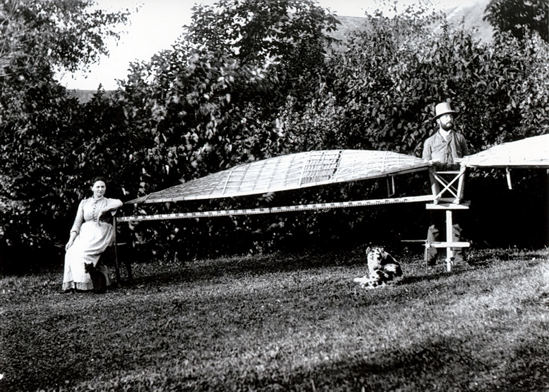 Ortitoptéra barona Artura Krause. Dáma vlevo je Krausova asistentka, slečna Gabrielová. Muž vpravo bývá někdy považován za Artura Krause, ale není to pravda, jedná se o Krausova majordoma.